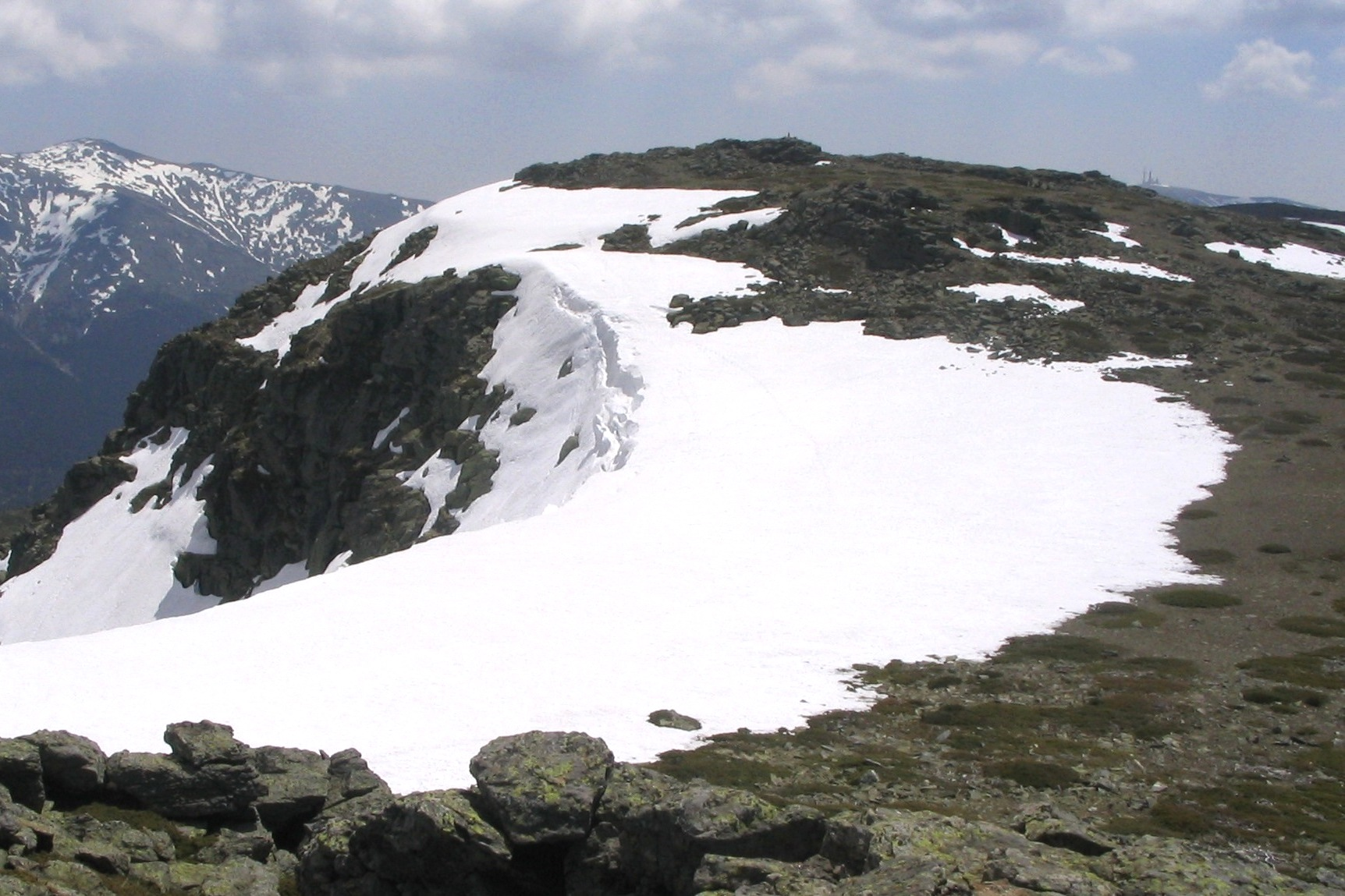 Cima de la Hermana Mayor (Sierra de Guadarrama)